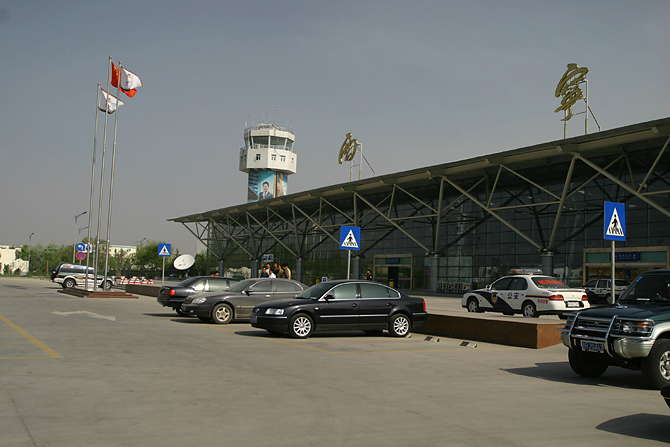 Xining Caojiabu Airport 西宁曹家堡机场